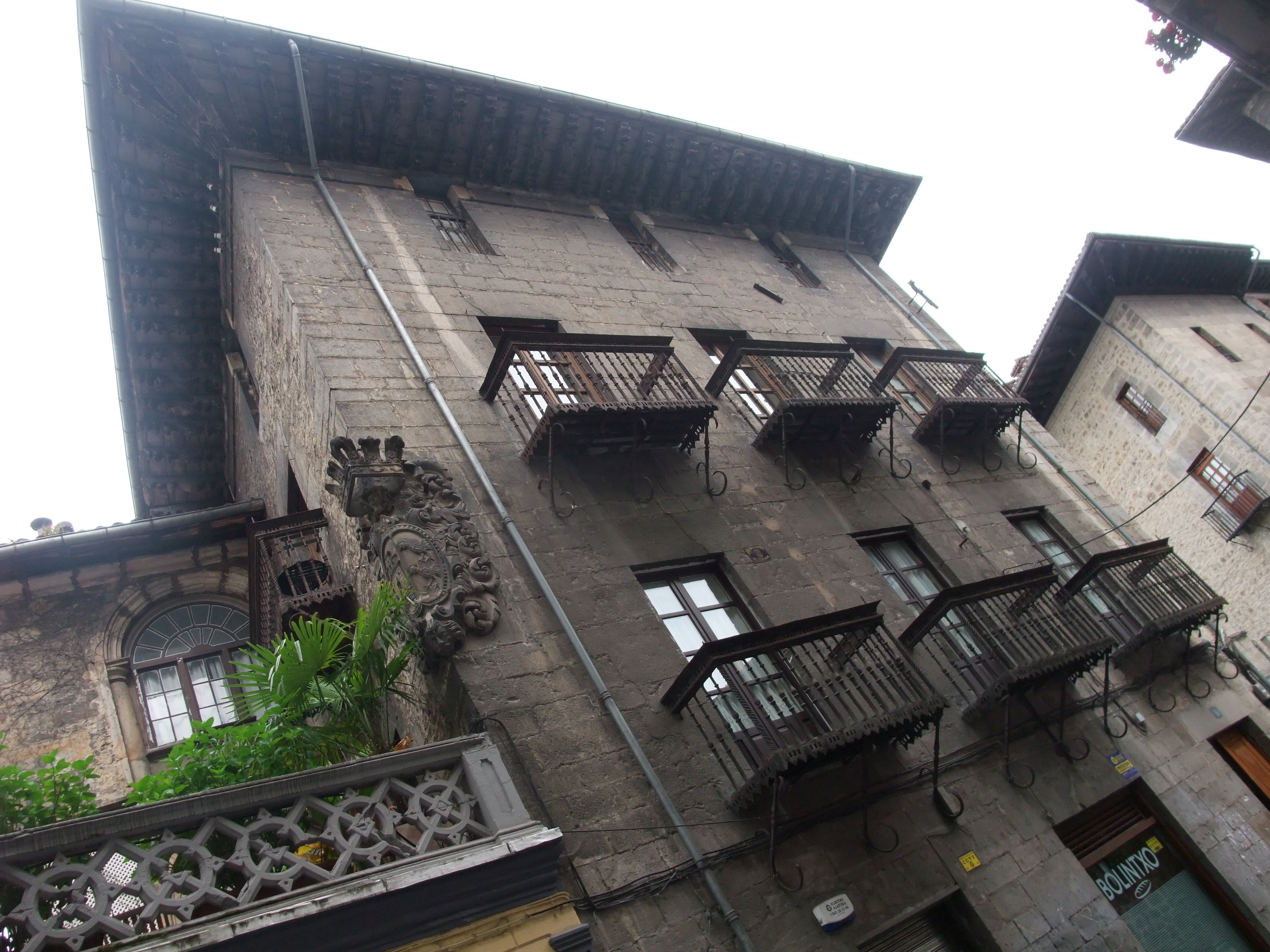 Vergara (Guipúzcoa)-Casa Moiua-Barrena-1